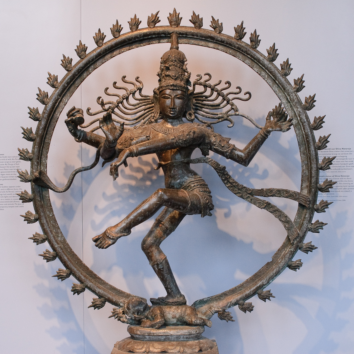 Shiva Nataraja (6274-1) Shiva Nataraja